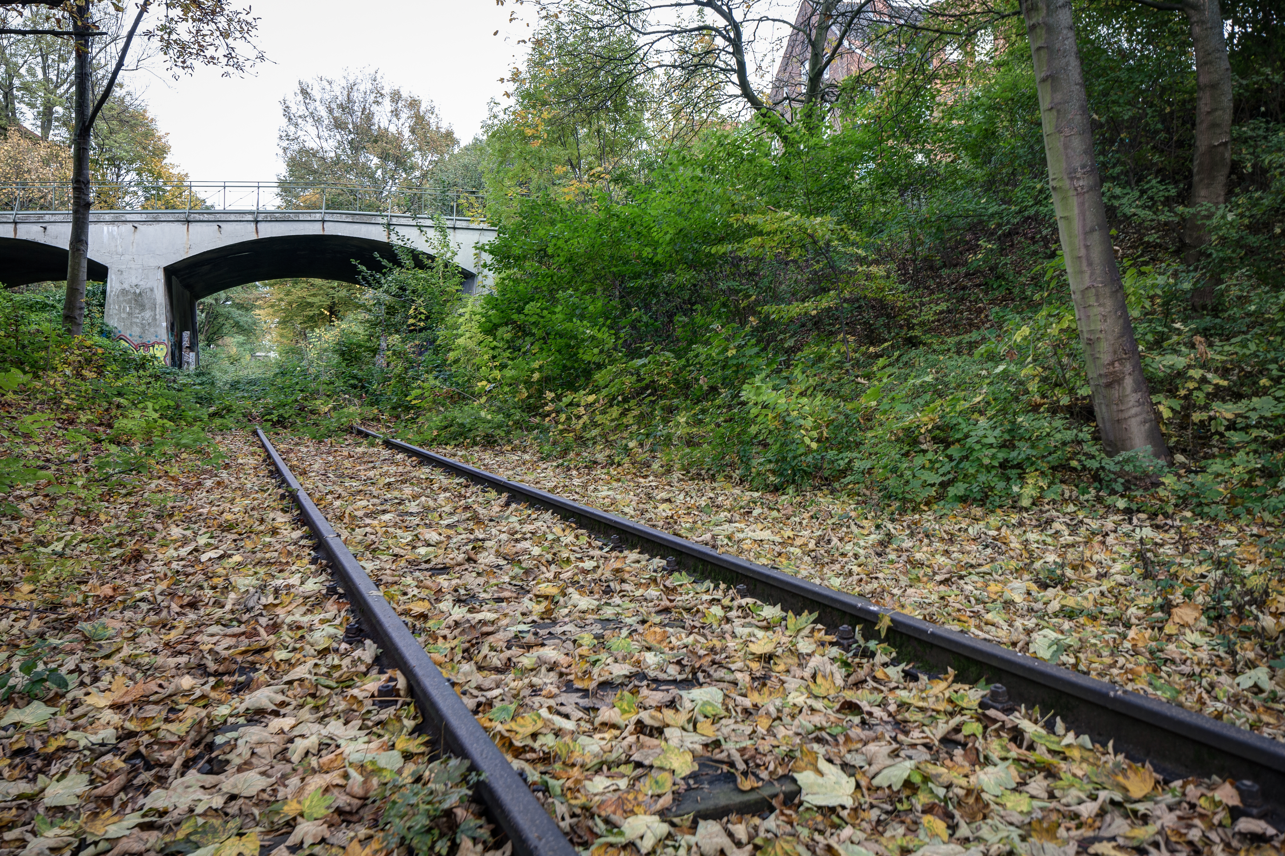 Stillgelegtes Anschlussgleis zum ehemaligen Bahnhof Küchengarten in Hannover-Linden. Auf der im Bild sichtbaren Brücke wird die Nieschlagstraße über das Gleis geführt.